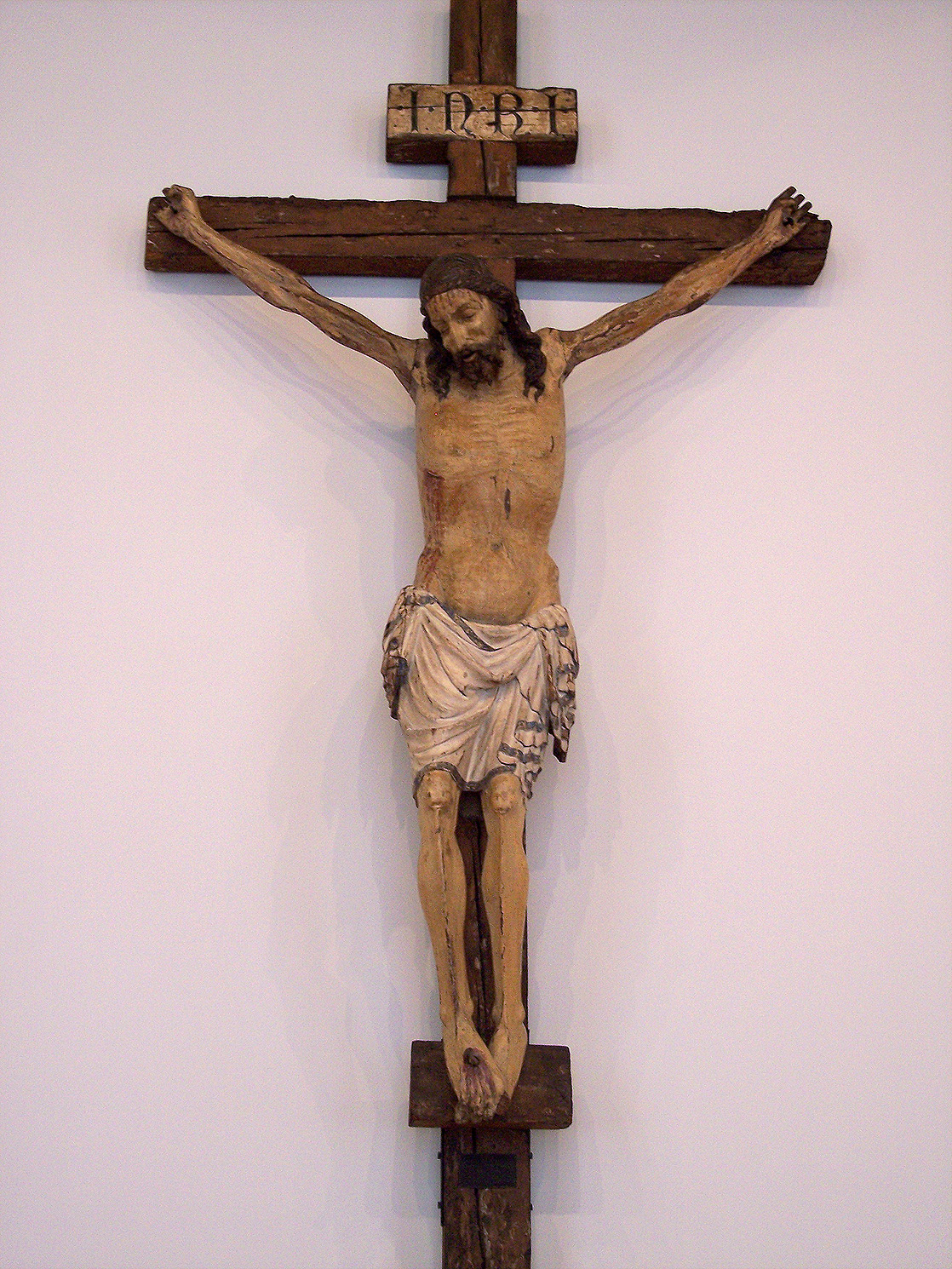 Andrea Bonvicino: Kruzifix Skulpturensammlung (Inv. 45), Bode-Museum, Berlin